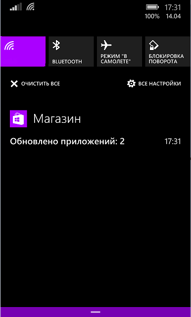 Центр уведомлений Windows Phone 8,1 .